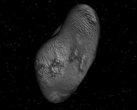 Himalia, Jupiter's moon